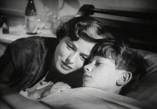 Screenshot del film Europa '51 di Roberto Rossellini - 1952